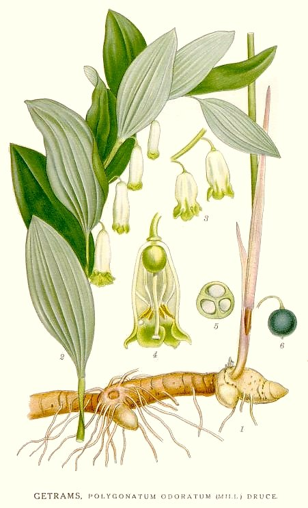 Polygonatum odoratum var. odoratum (Mill.) Druce. Original Description Getrams, Polygonatum odoratum (Mill.) Druce.